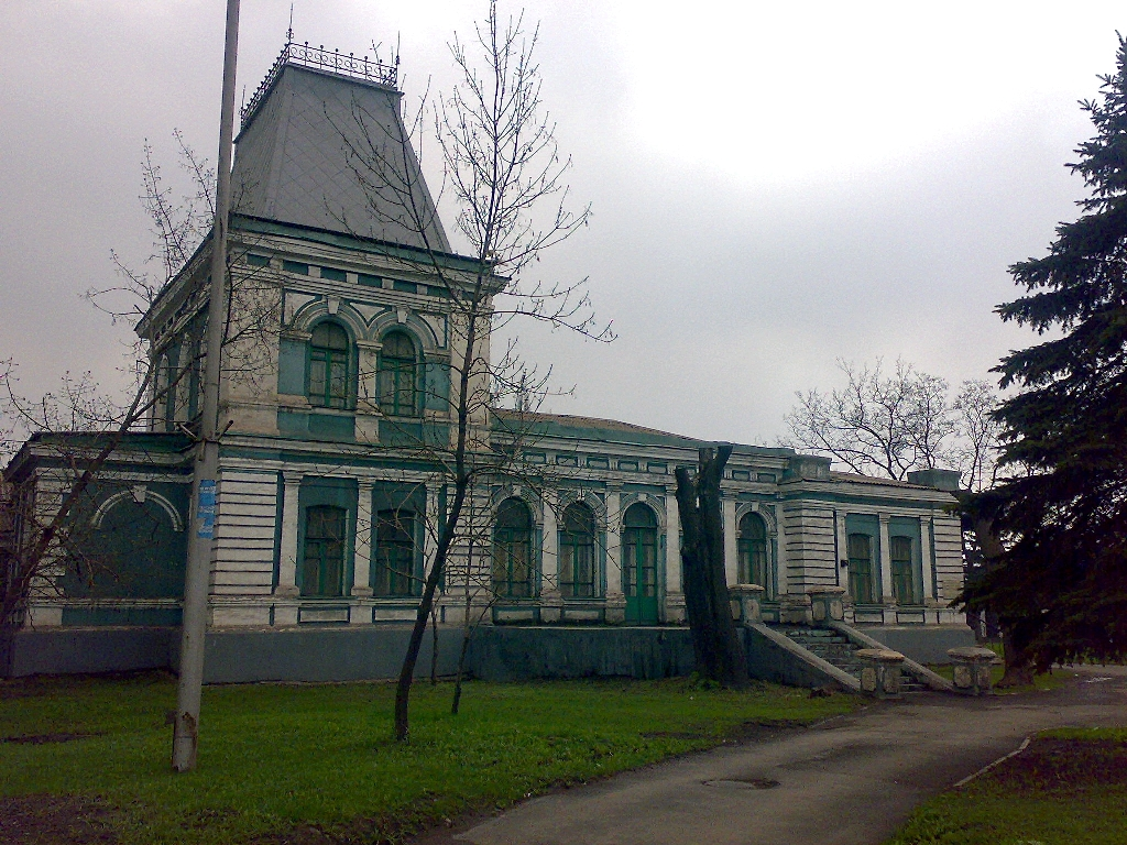 Будинок колишнього керуючого заводом ДЮМО, Алчевськ, просп. К. Маркса